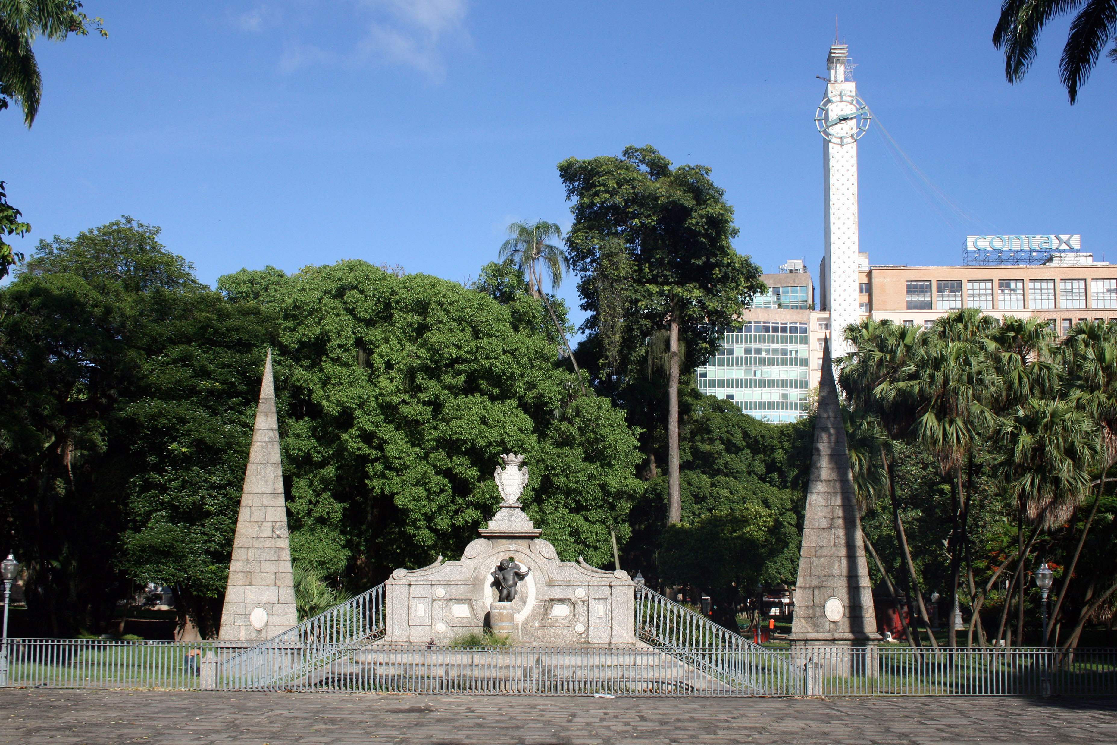 Passeio Público, Fonte dos Amores – Chafariz do Menino.